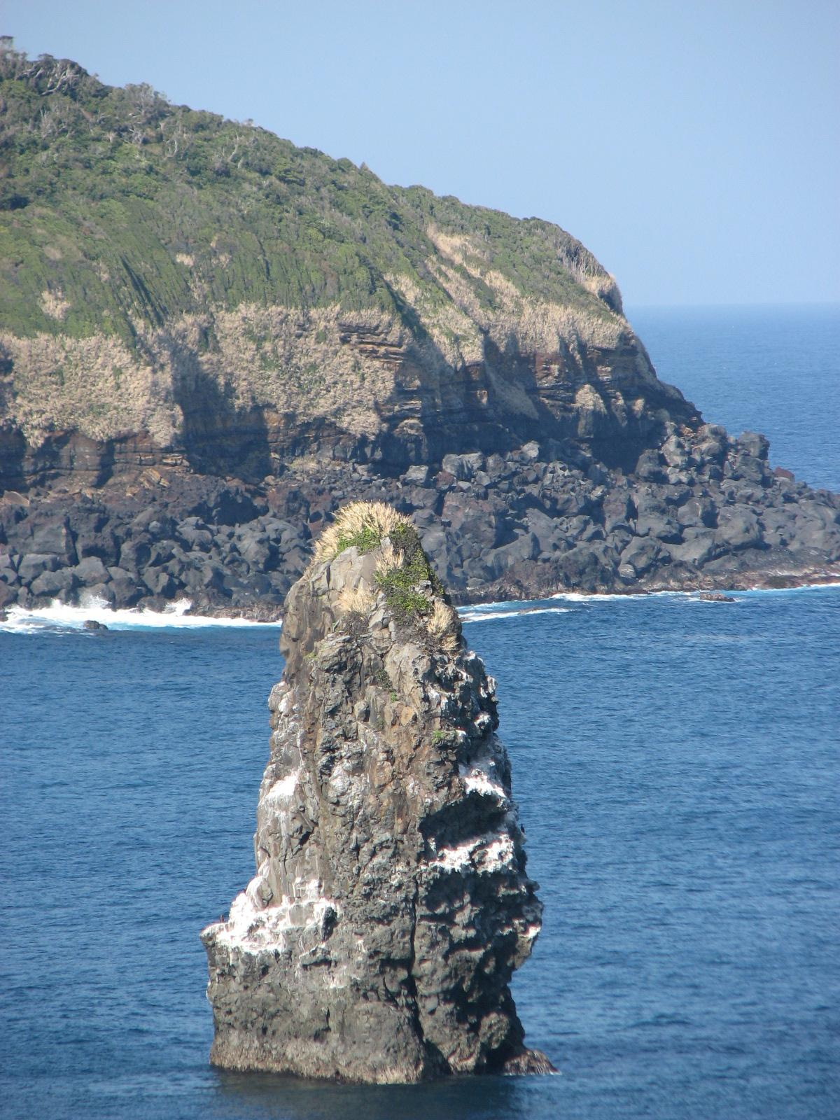 Fudeshima in Oshima, Tokyo, Japan.